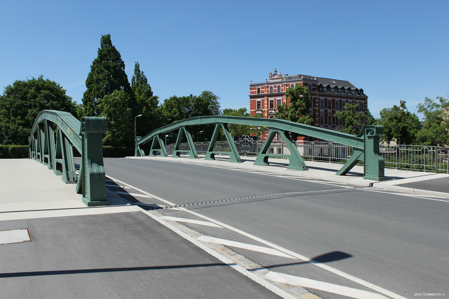 Chemnitz, Brücke Bernhardstraße 2010